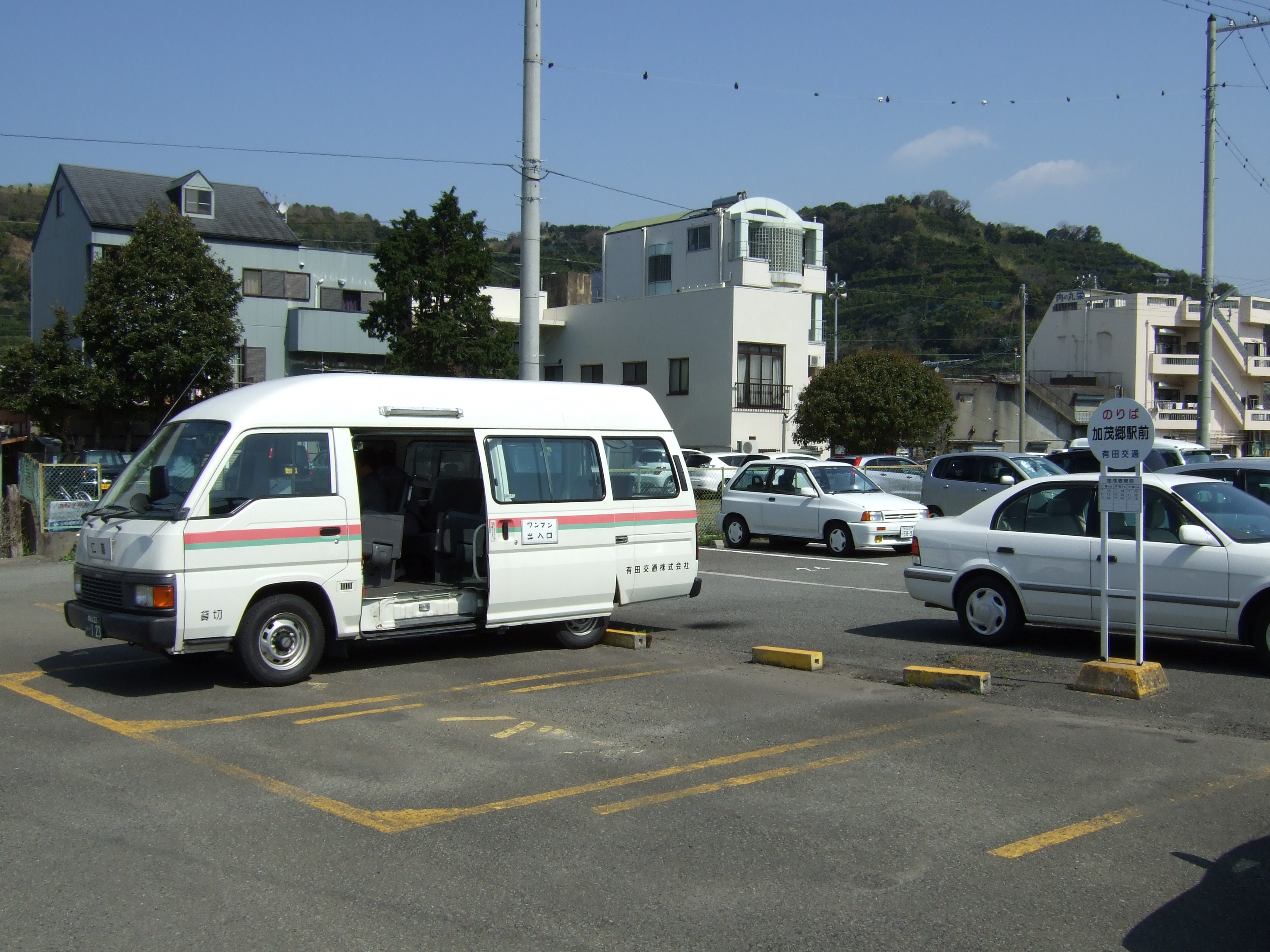 加茂郷駅有田交通バス